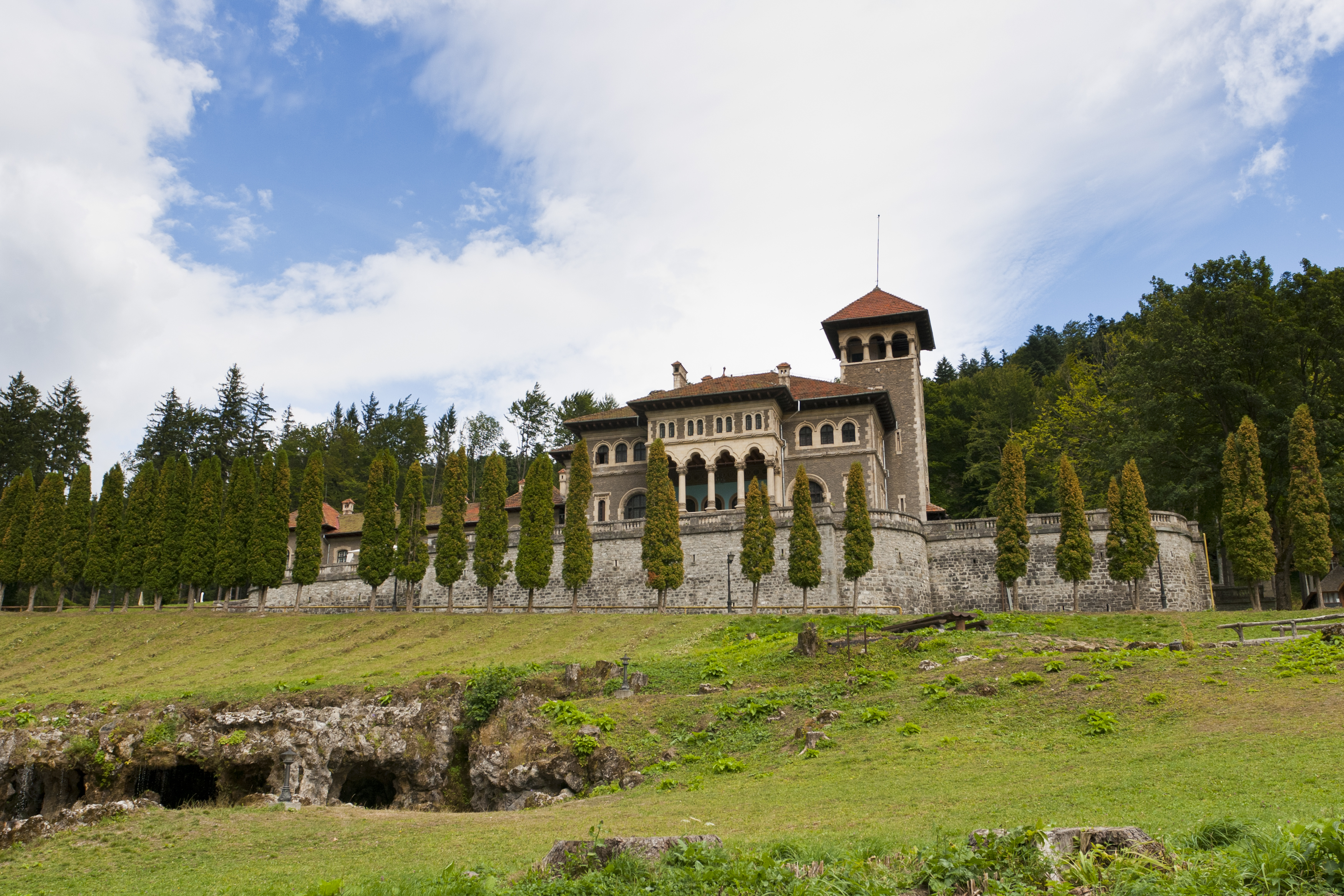 Castelul Cantacuzino - Buşteni 02